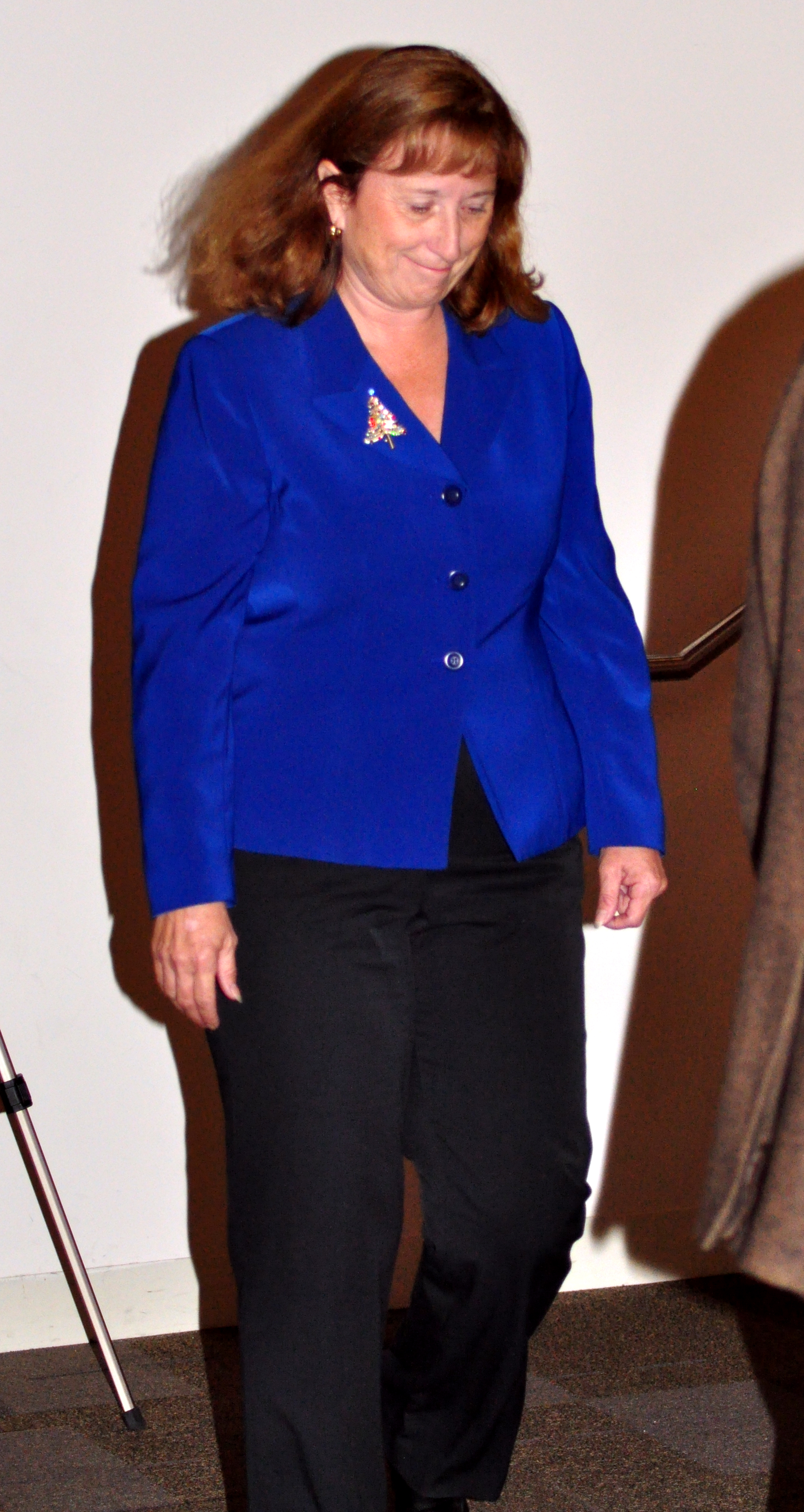 State Senator Ellen Corbett